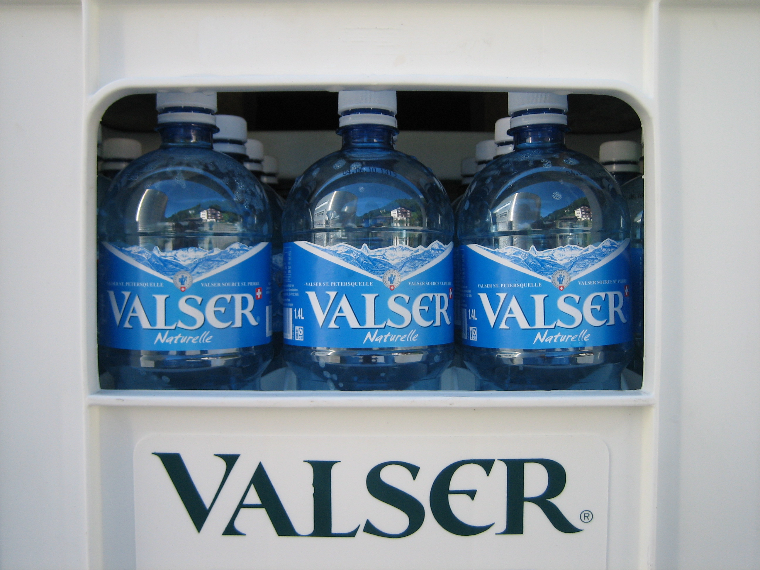 Valserwasser